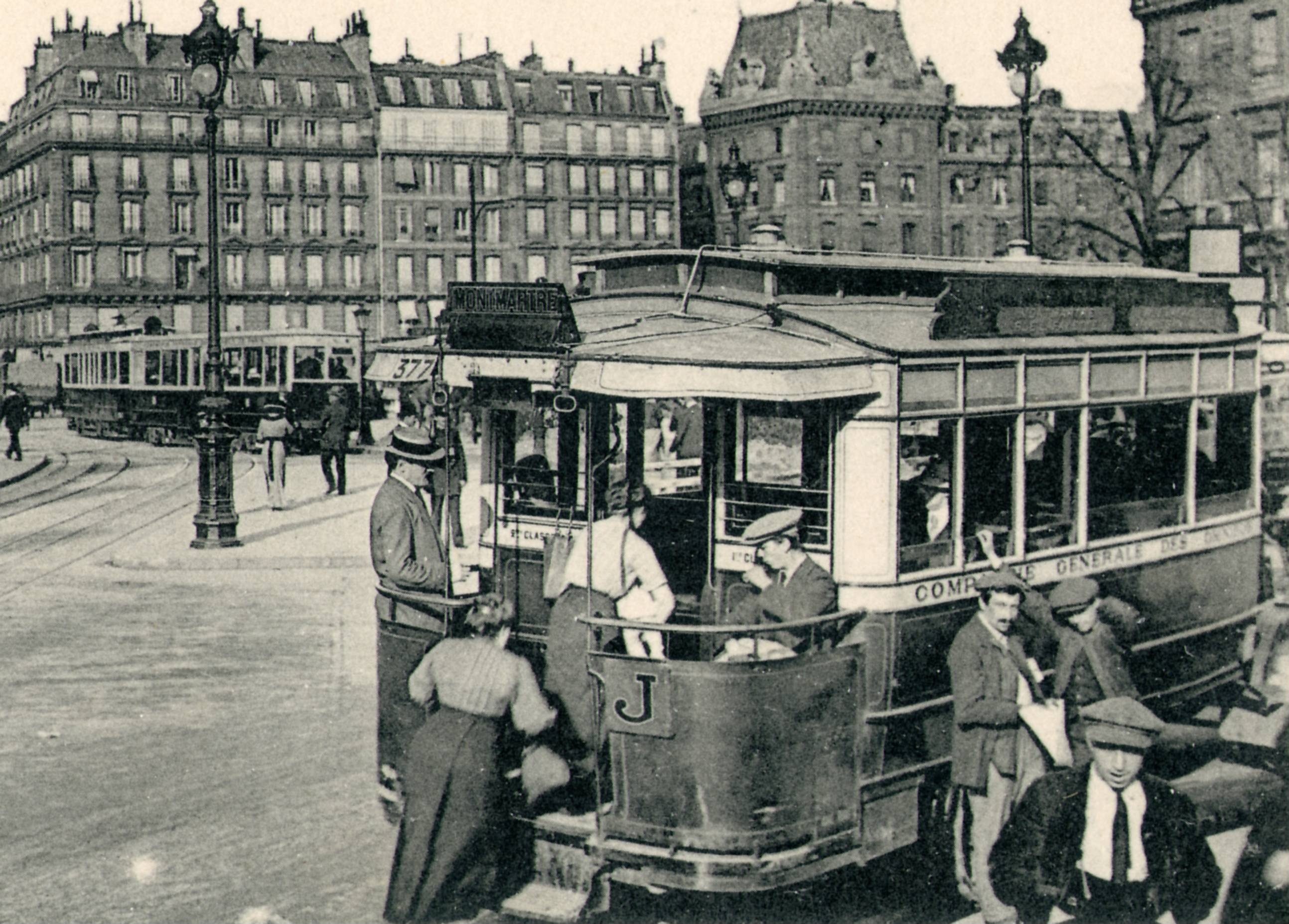 détail de ma carte postale ancienne éditée par CM N°1227 Paris : La Place saint Michel Autobus de la CGO ligne J (Montmartre - Place Saint-Jacques) et tramway ; Lanterne d'éclairage public à incandescence très vraisemblablement A. Durenne L 1 fabriquée à partir de 1931.